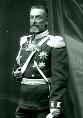 Русский генерал, товарищ министра внутренних дел Константин Николаевич Рыдзевский (1852-1929)